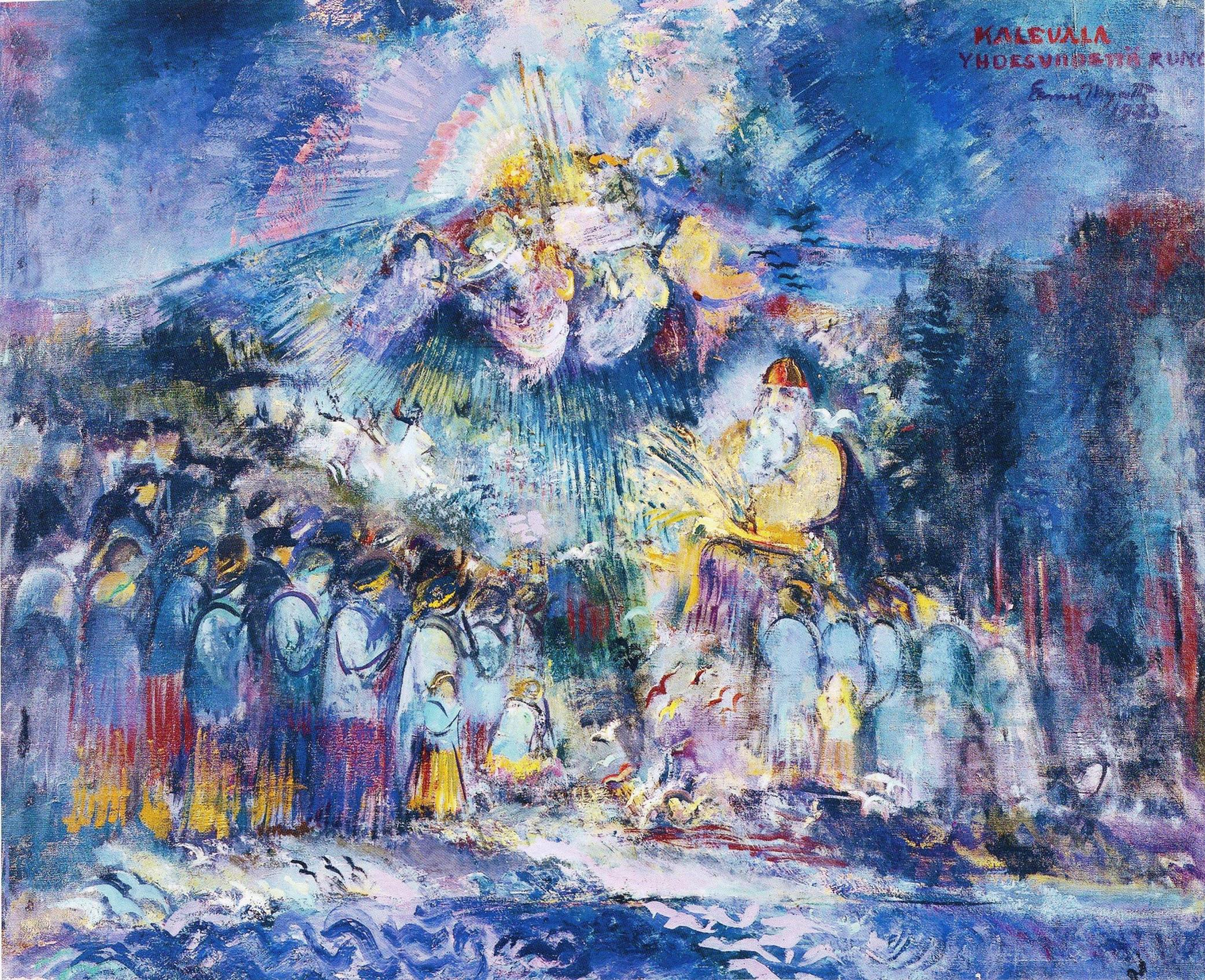 Eemu Myntin Kalevala-aiheinen ekspressionistisen maalaus Väinämöisen soitosta.